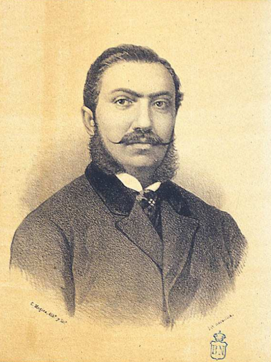 Retrato de Sabino Herrero Olea.